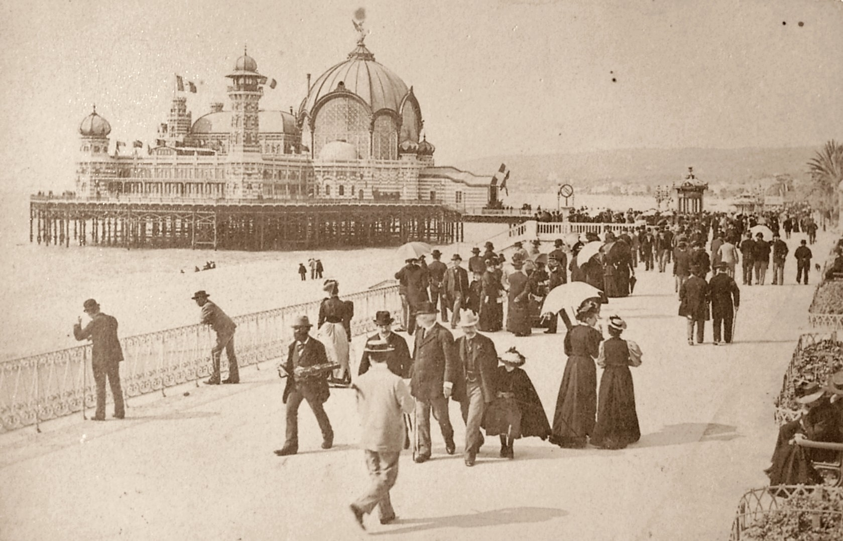 Nice Le Palais de la Jetee-Promenade ca. 1880.